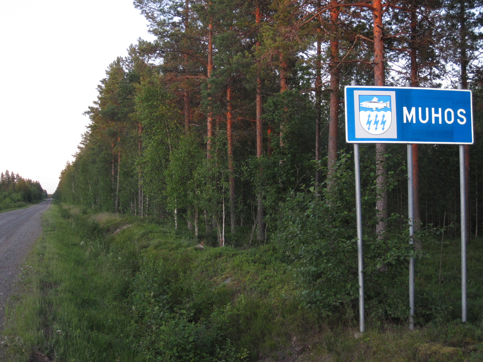 Muhoksen kunnanrajakyltti yhdystiellä 8240 (Kylmäläntie) Tyrnävältä Kylmälänkylään johtavalla tiellä